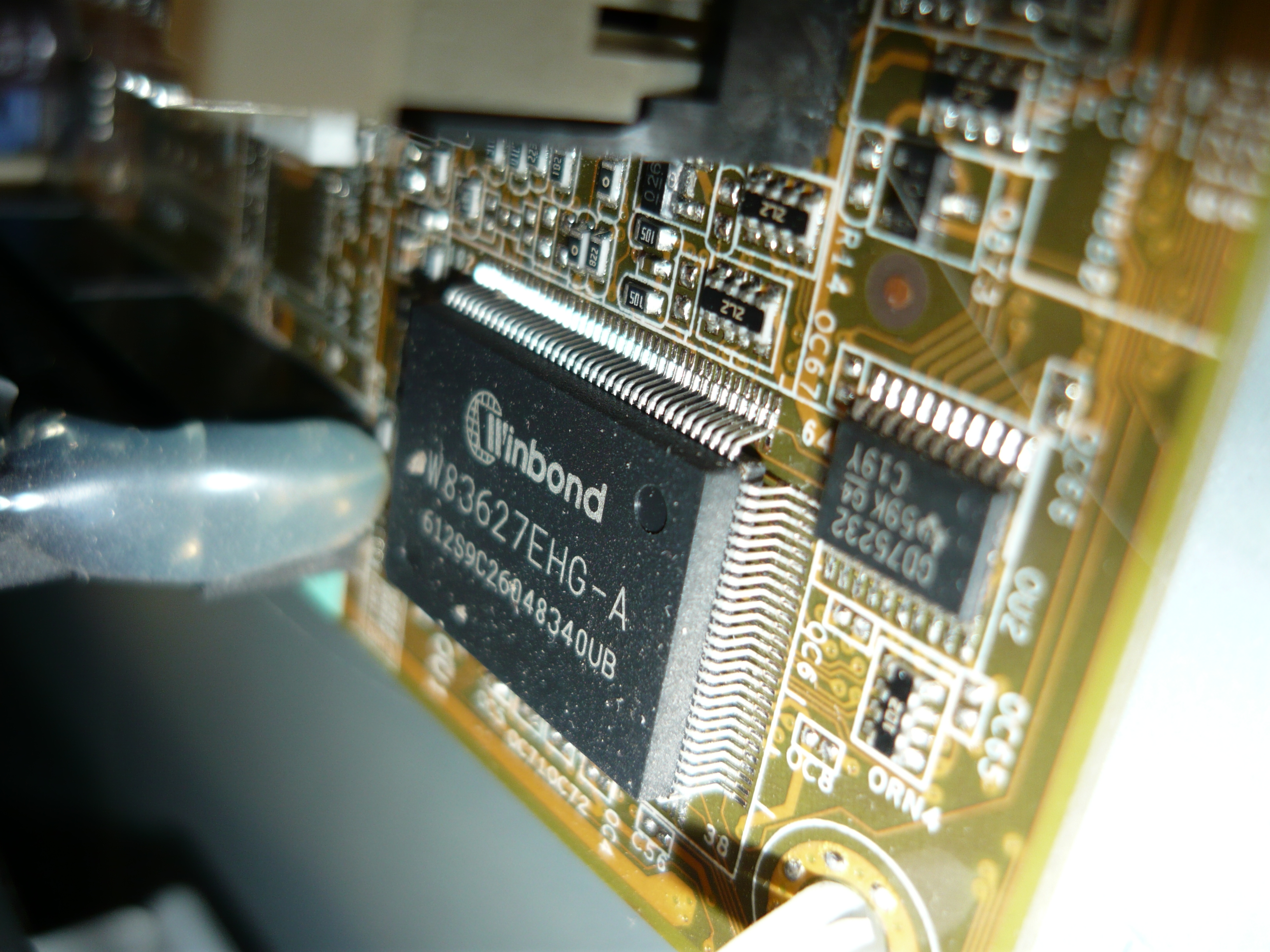 Мультиконтроллер Winbond W83627EHG-A